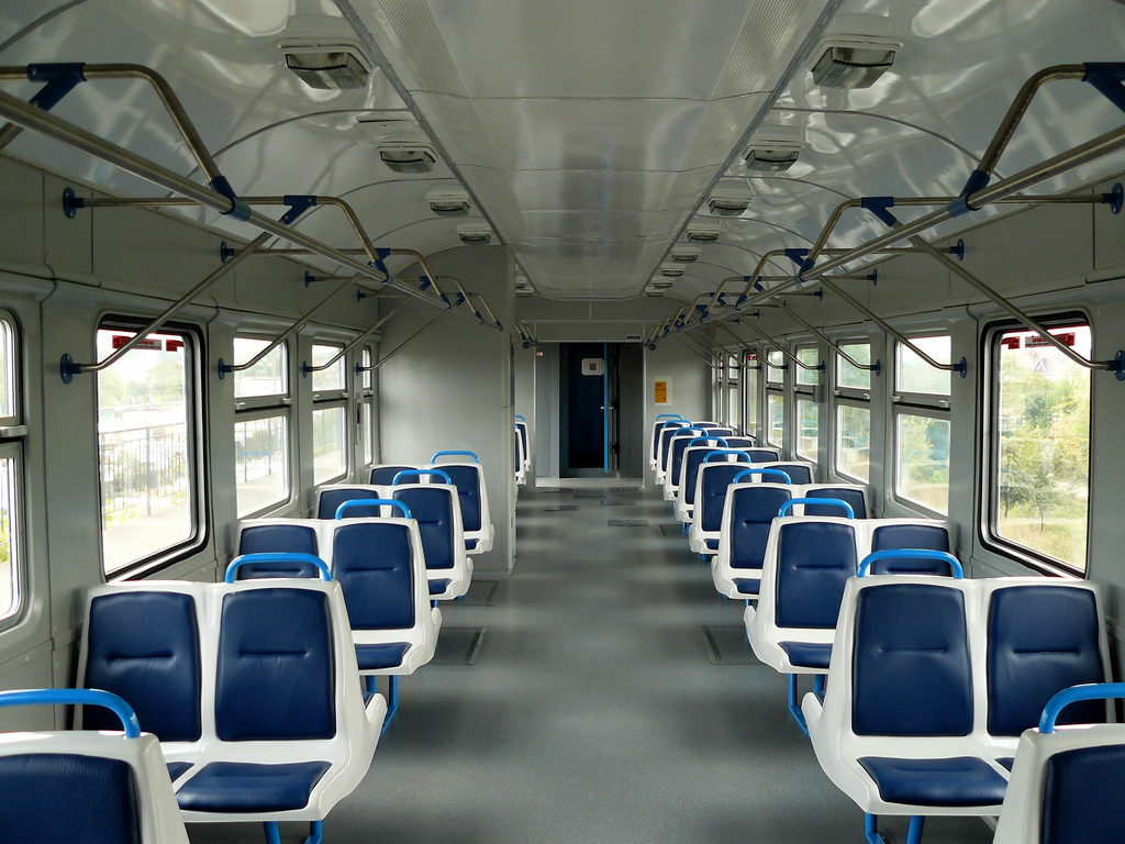 Салон вагона ЭР9М-539-08 модернизированый для работе на маршруте городской электрички г. Киева